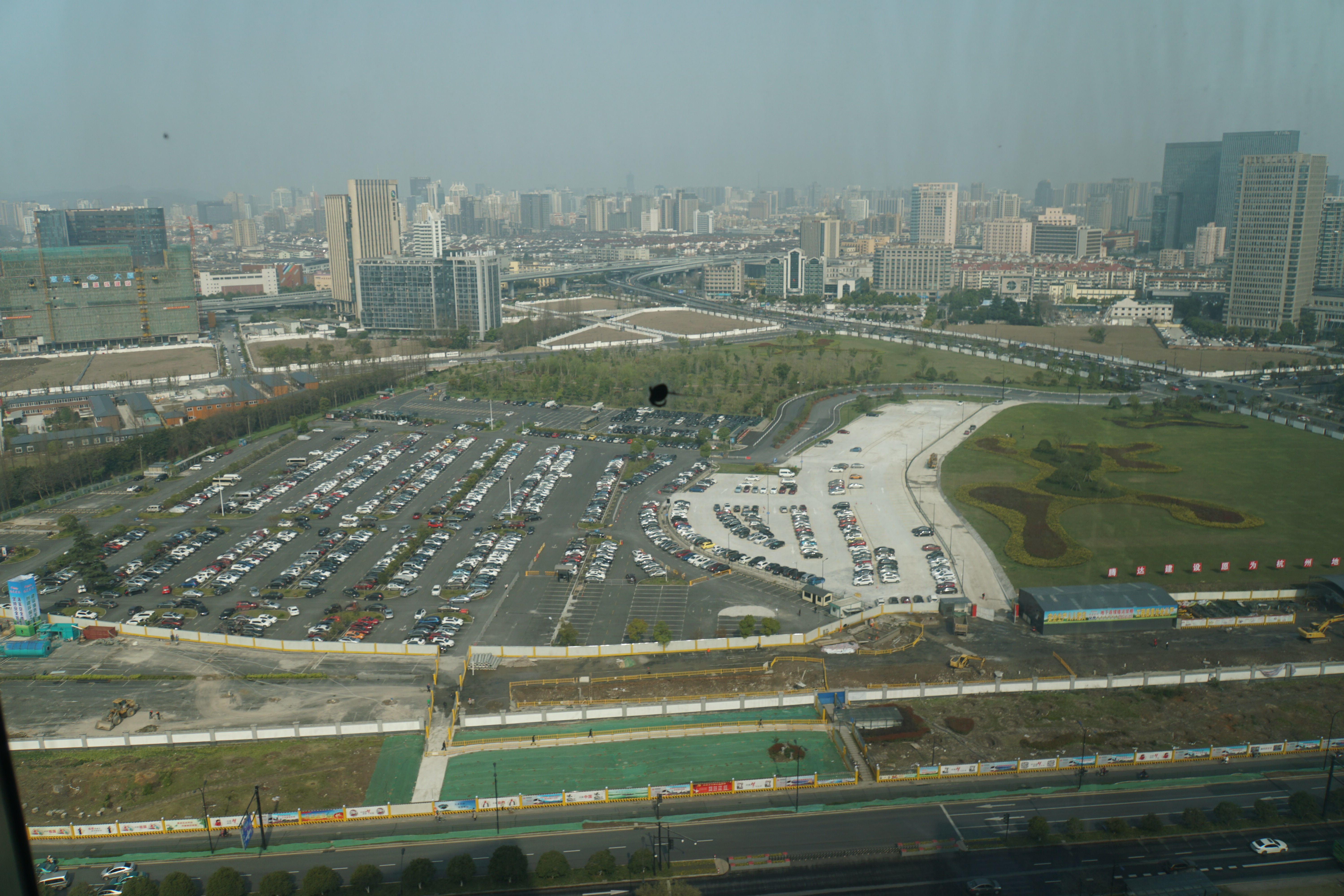 设置于市民公园地块内的市民中心P3停车场